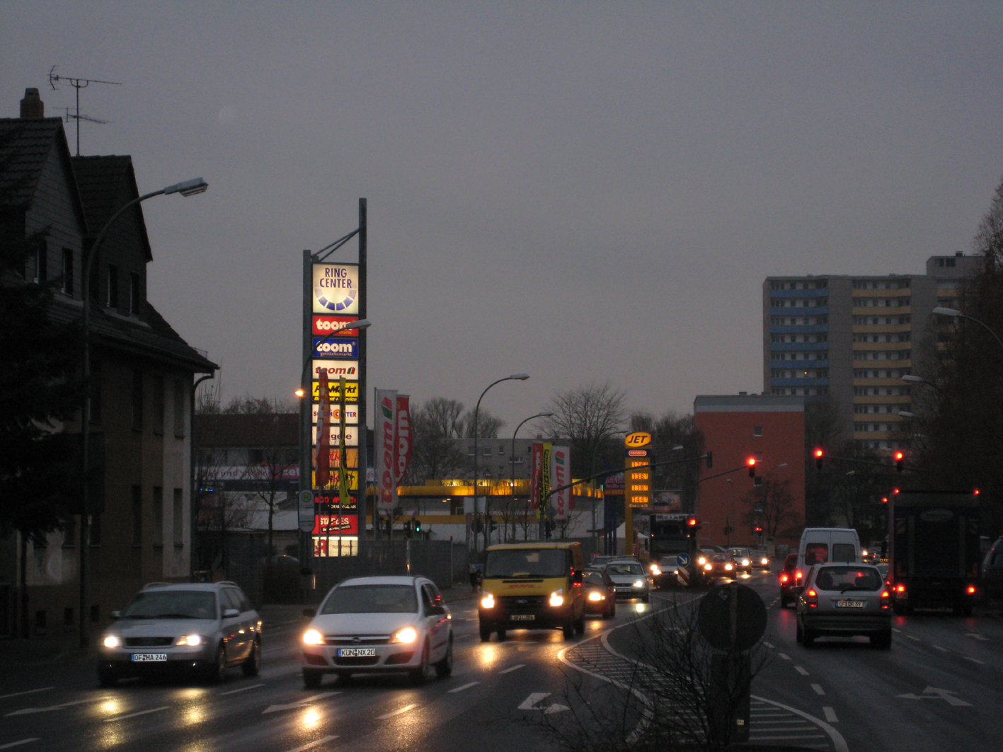 Odenwaldring, Offenbach-Lauterborn